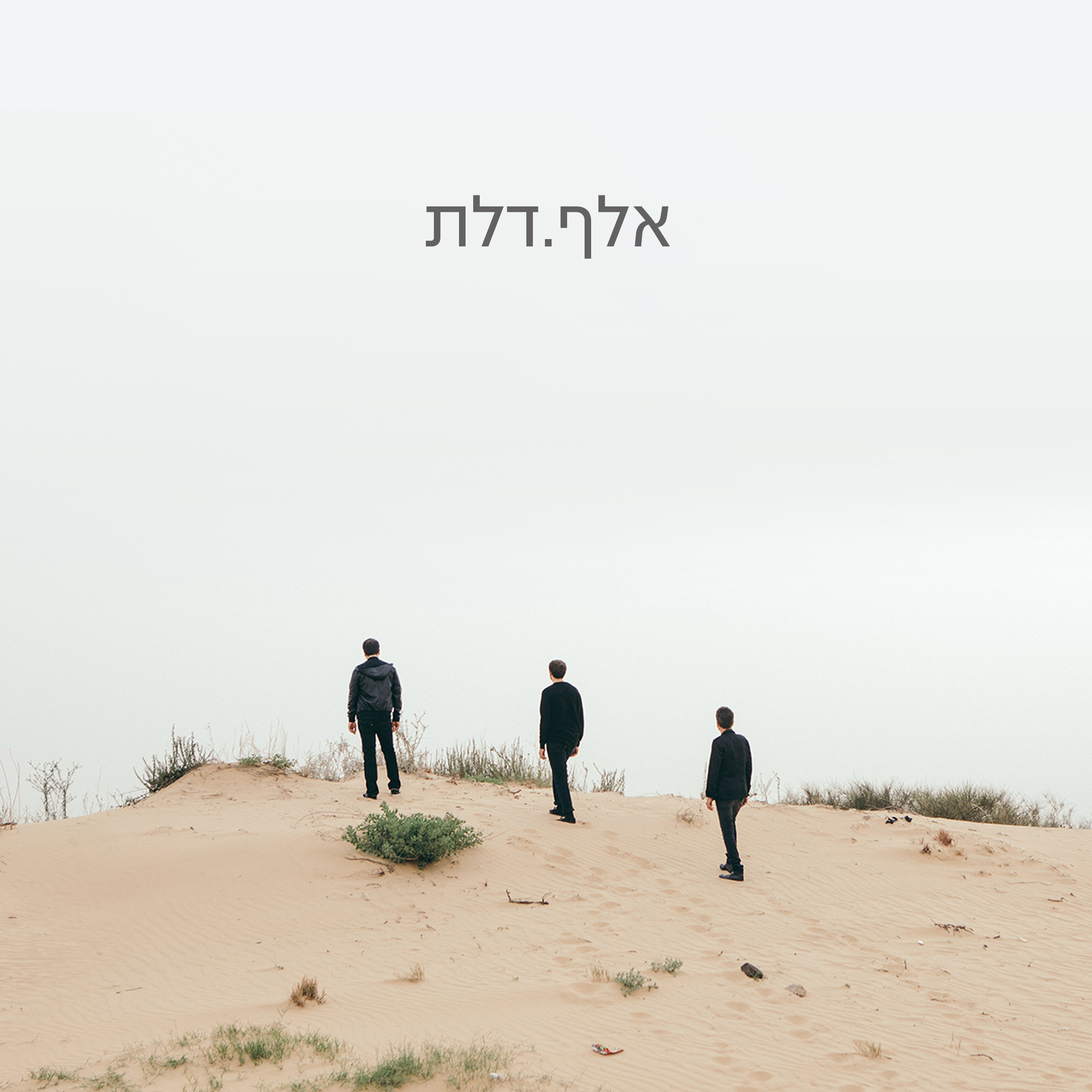 אלף.דלת